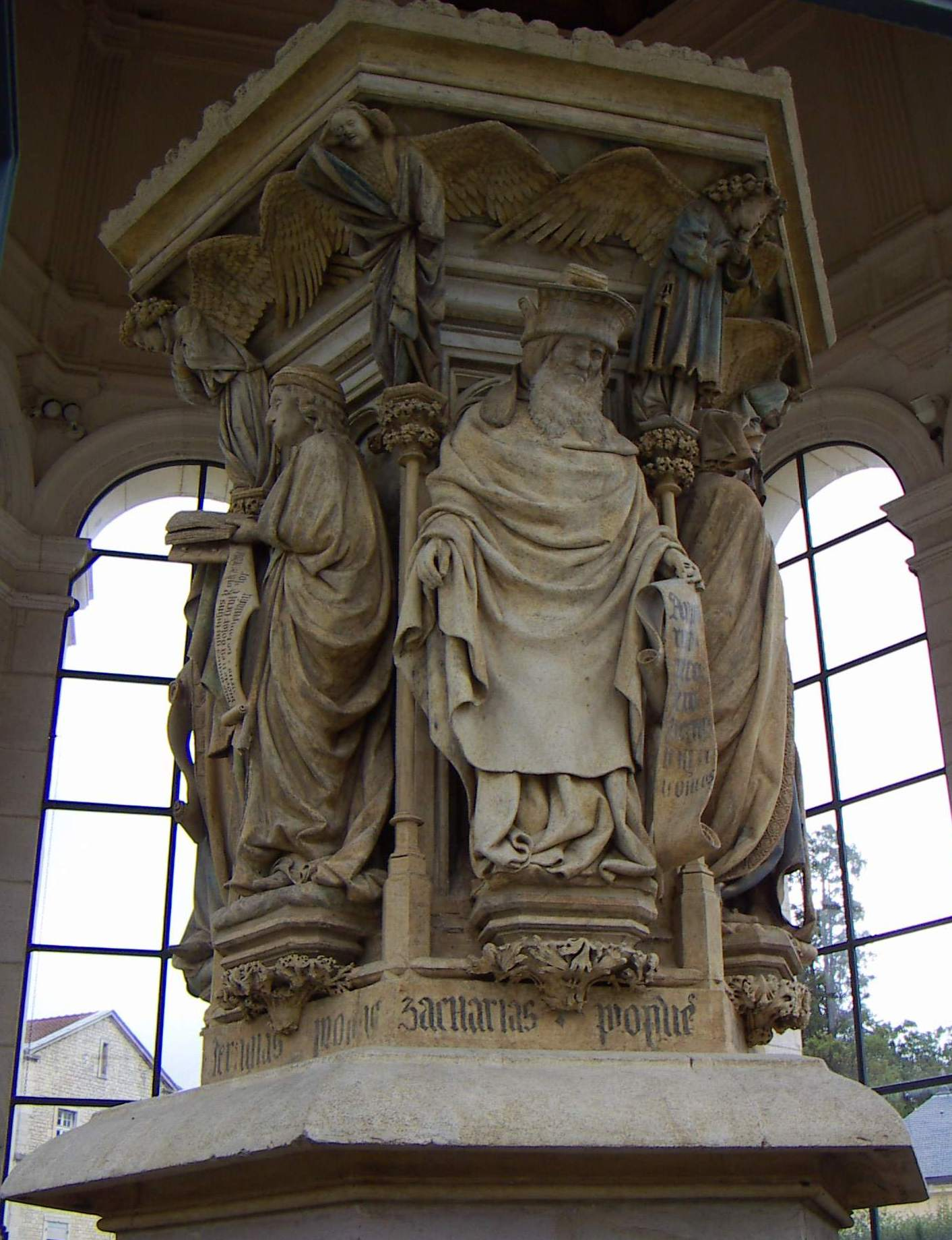 Puits de Moïse, Dijon, France